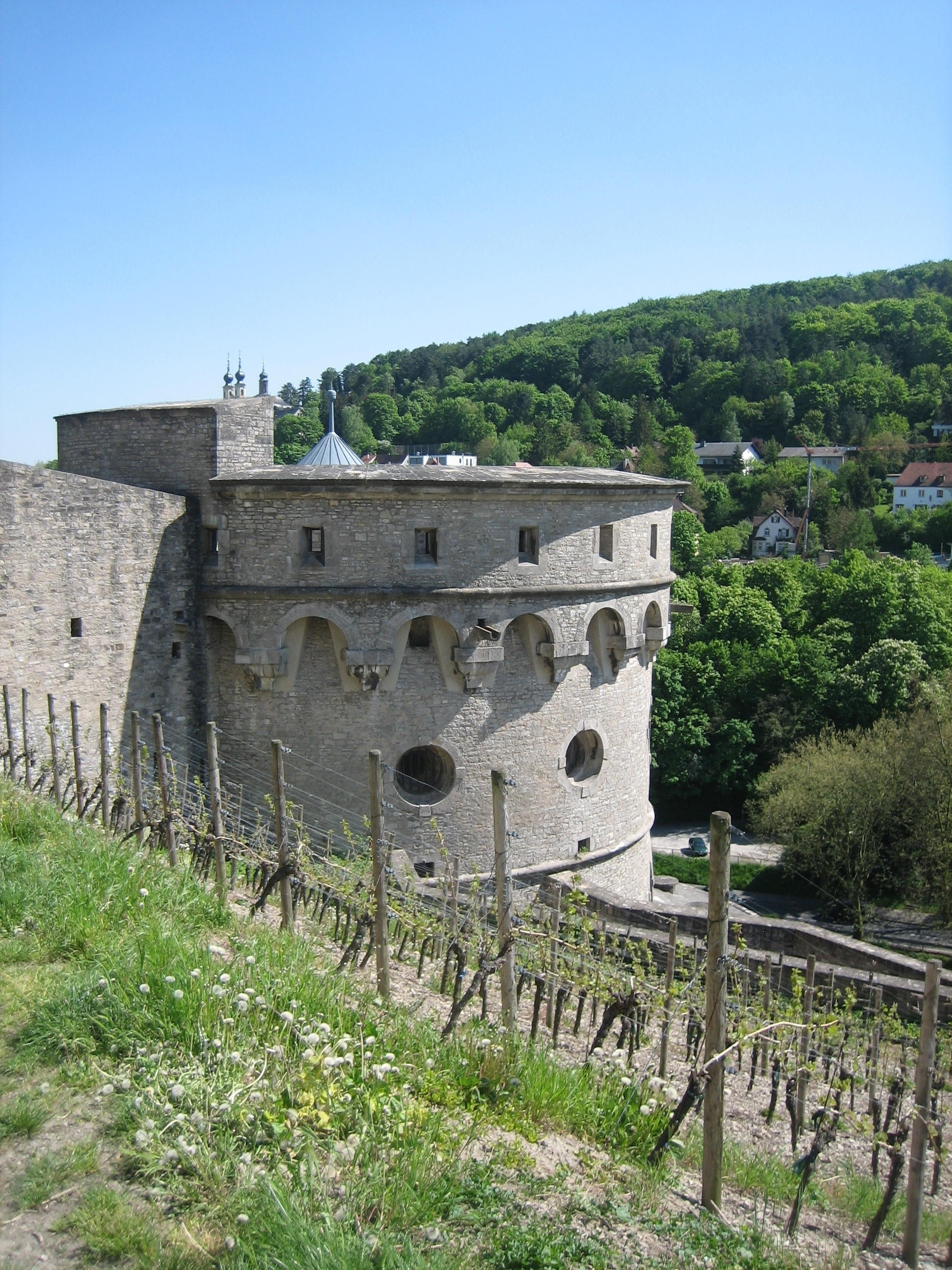 Maschikuli tower of Wurzburg fortress, Germany / Maschikuliturm, Festung Würzburg